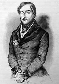 Francesco Saverio del Carretto (1777–1861), militare e politico